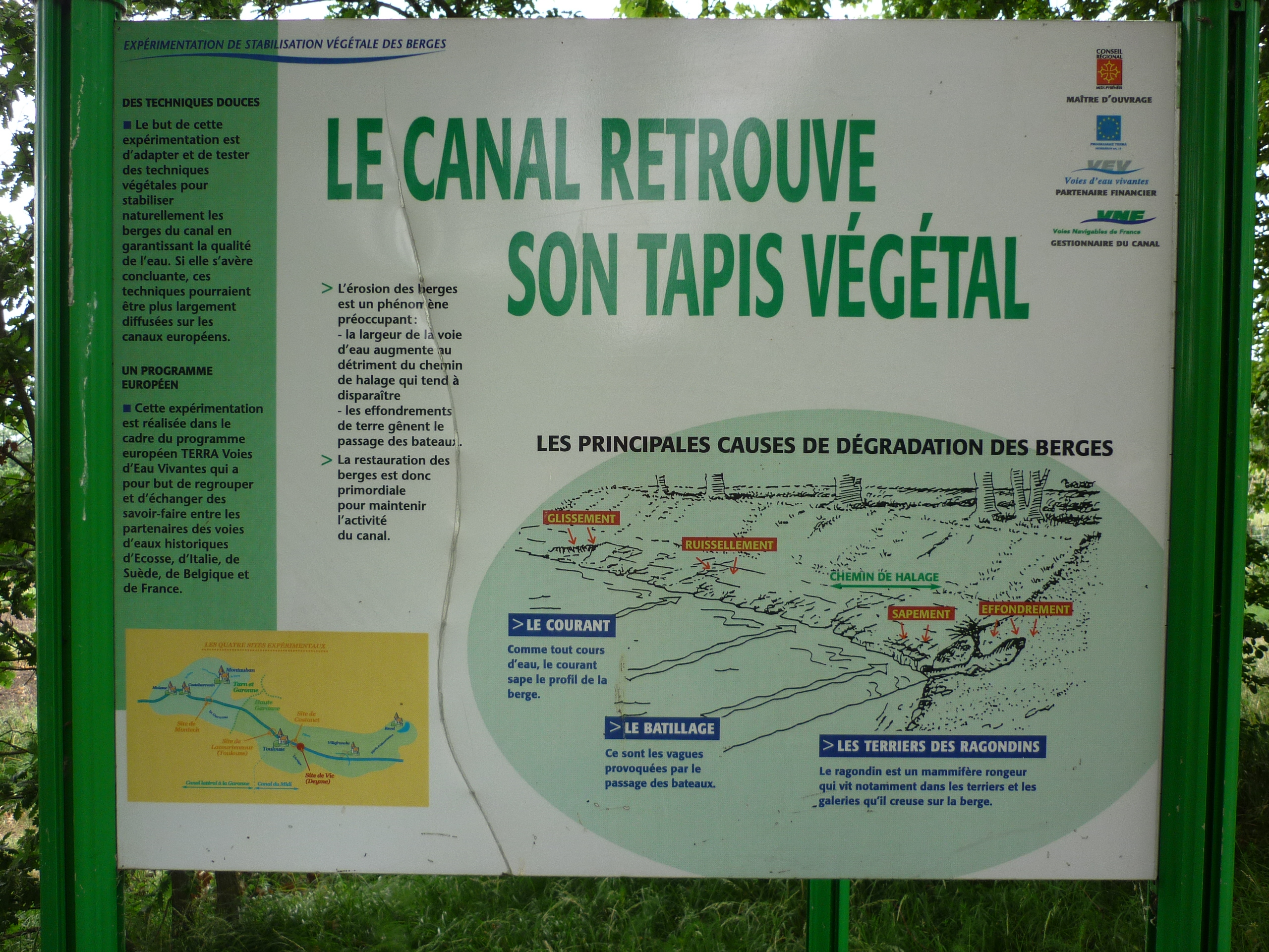 Panneau présentant des travaux de génie écologique, notamment l'anti-batillage des berges par stabilisation végétale, sur le canal du midi en amont de Toulouse (site de Vic)